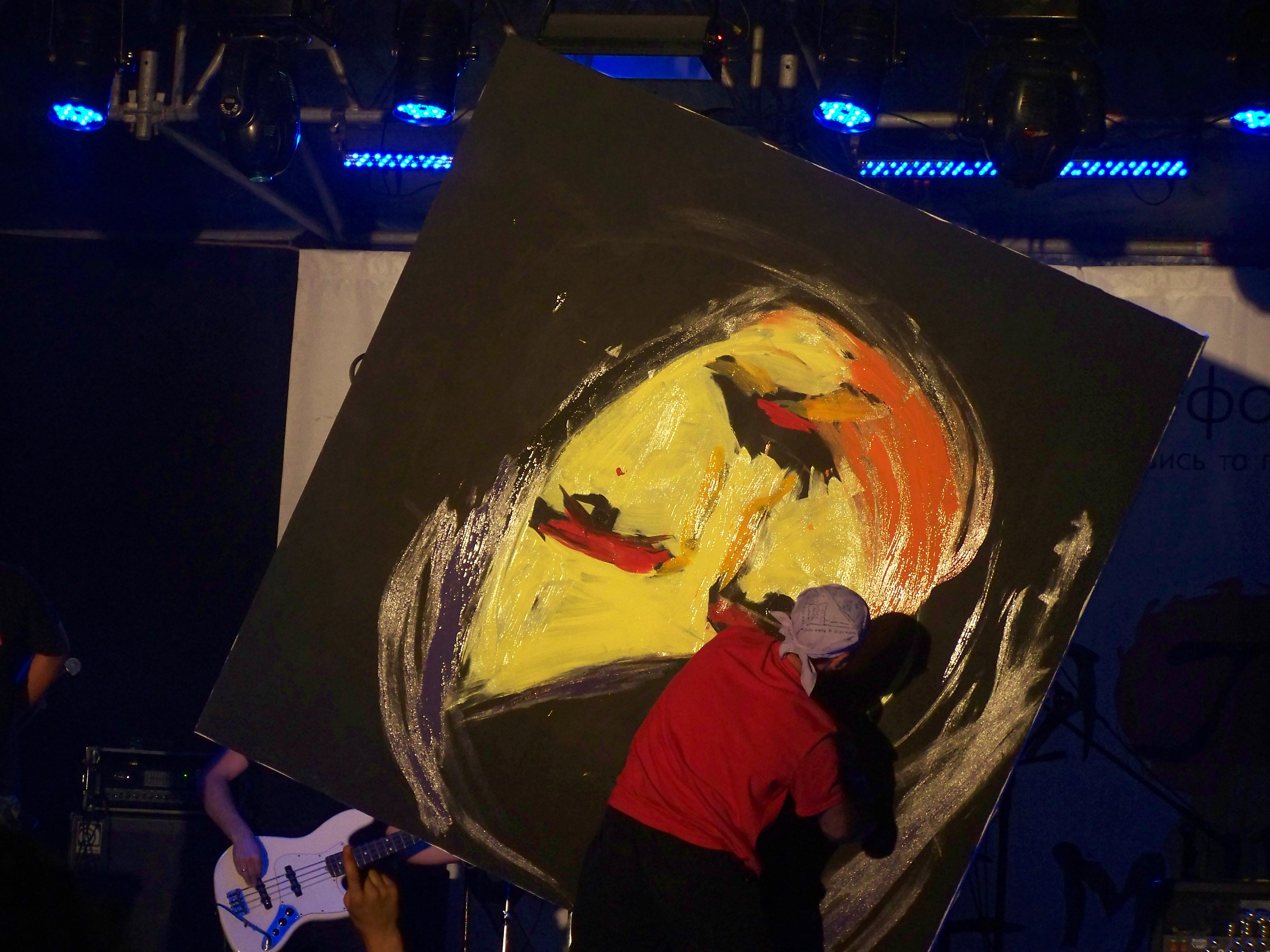 на фестивалі "Потяг до Яремче"